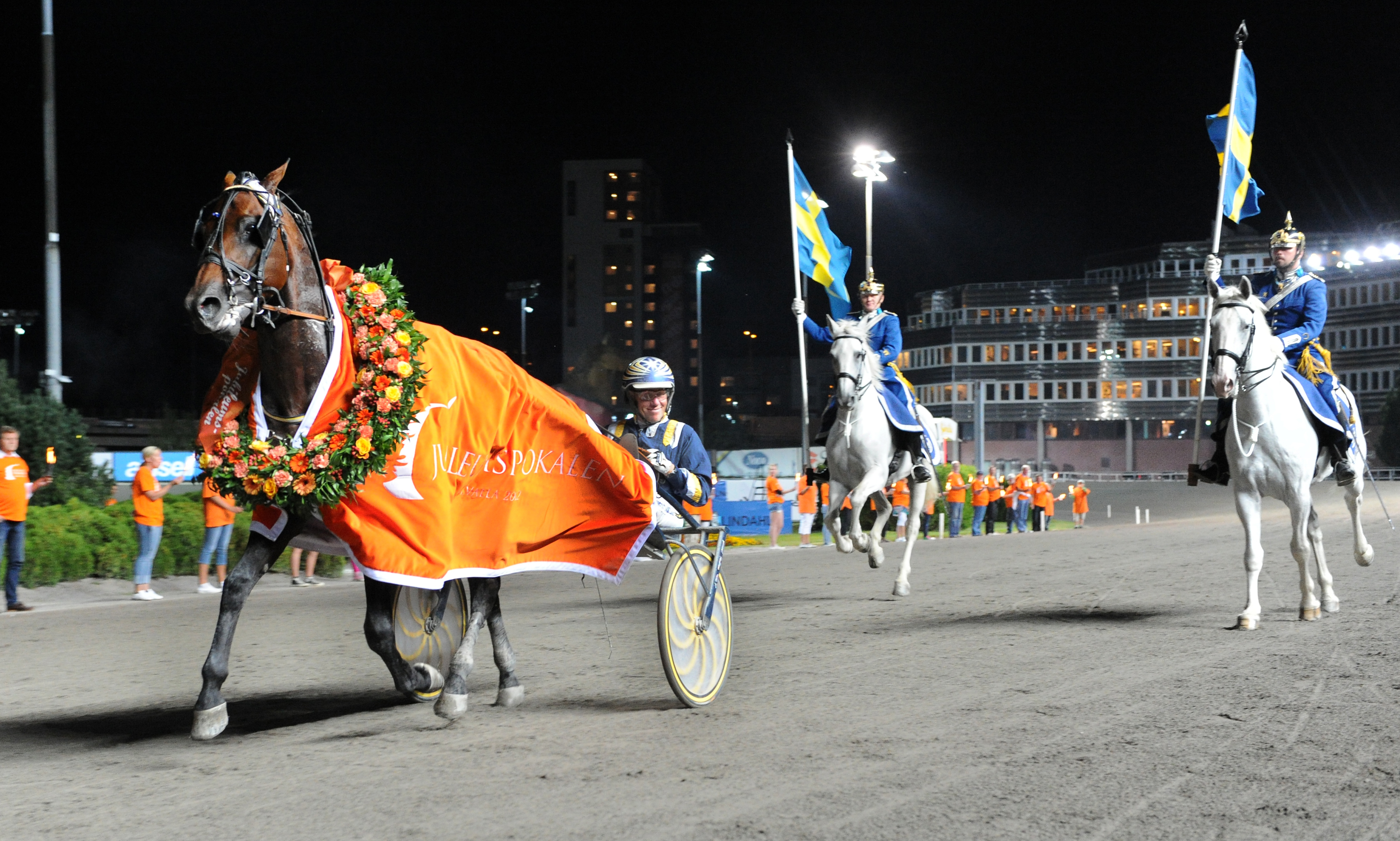 Friction och Stefan Melander efter segern i Jubileumspokalen på Solvalla i augusti 2012.